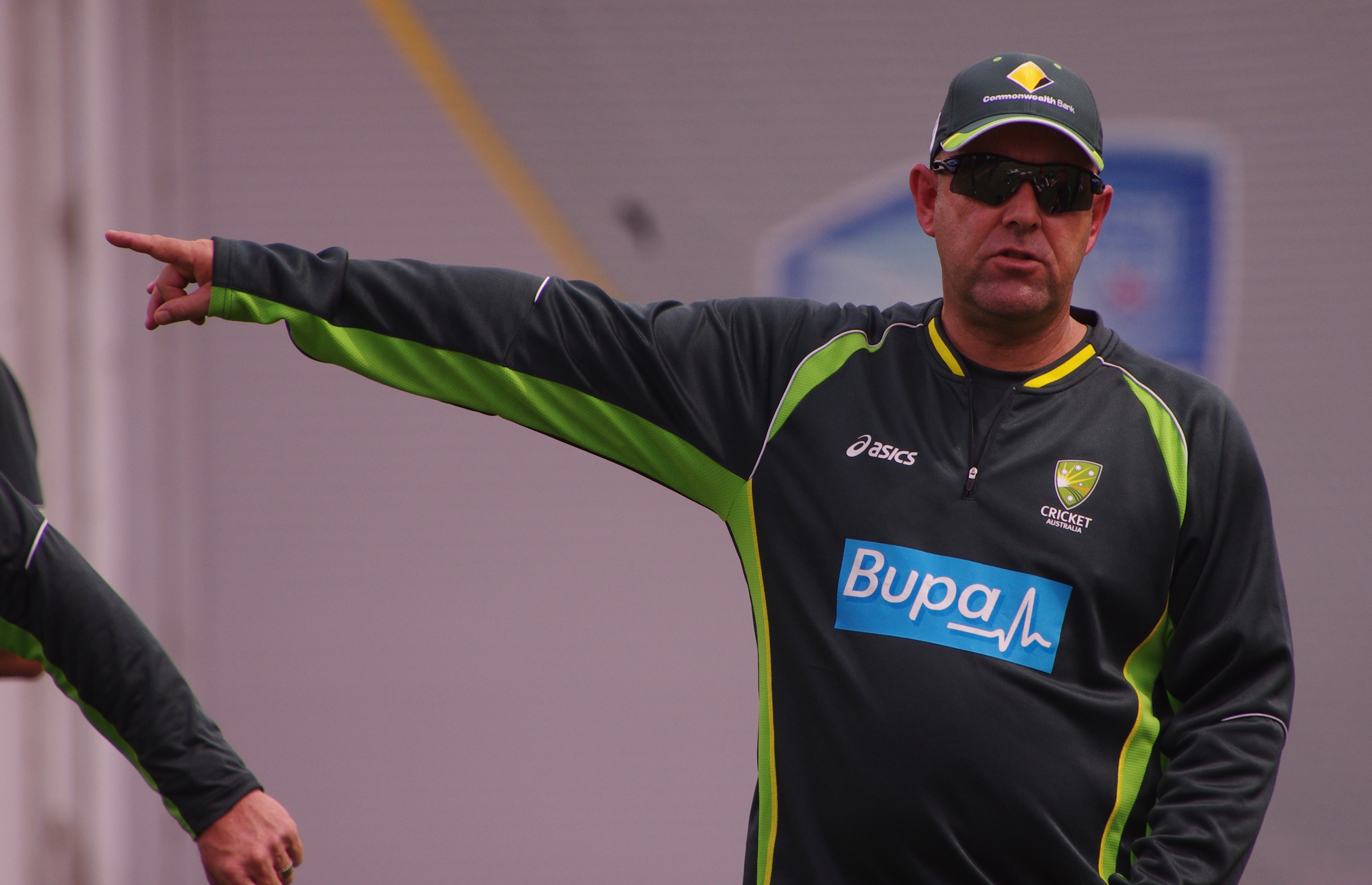 DARREN LEHMANN